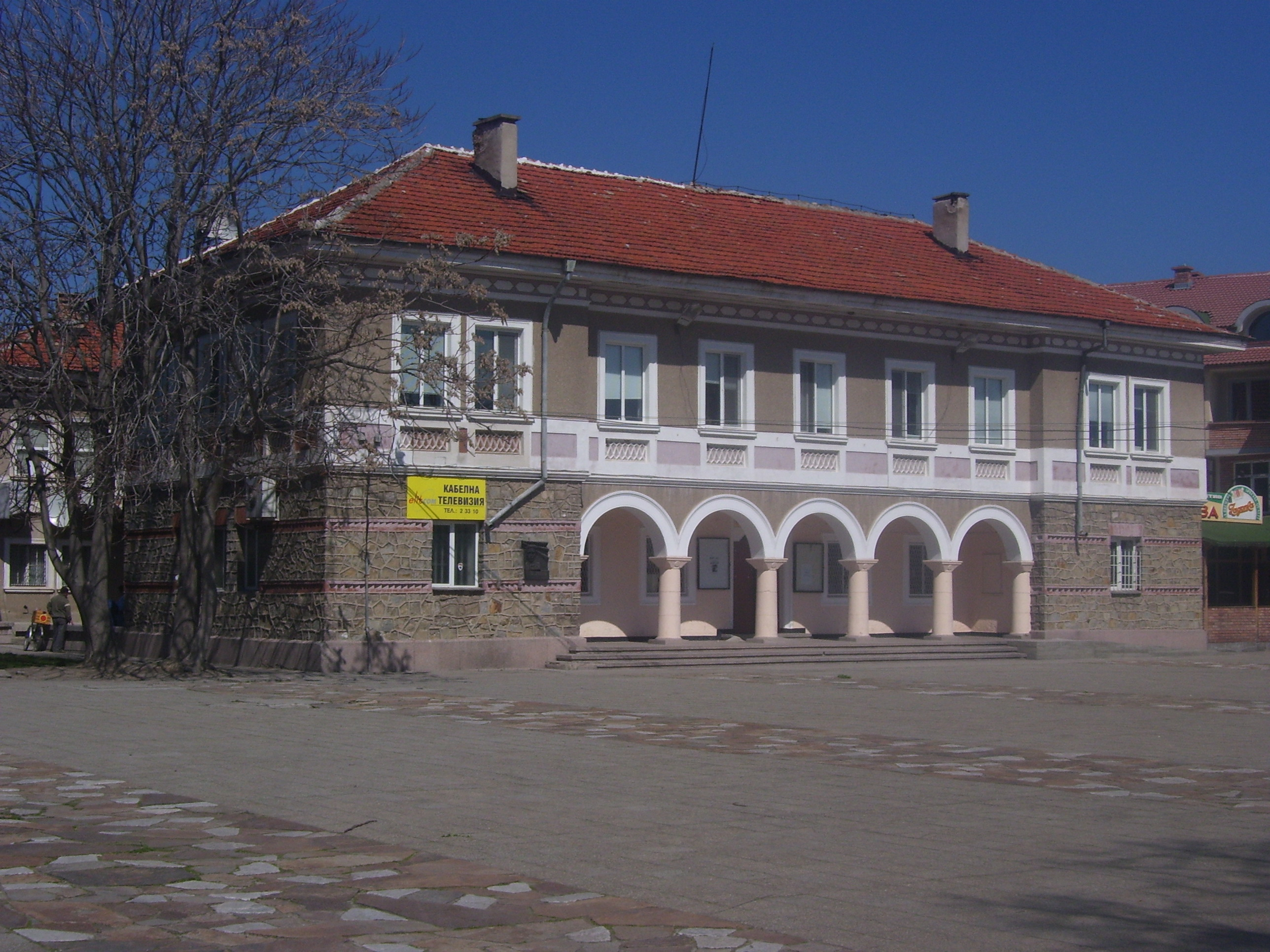 Читалището в град Съединение (Голямо Конаре), България.